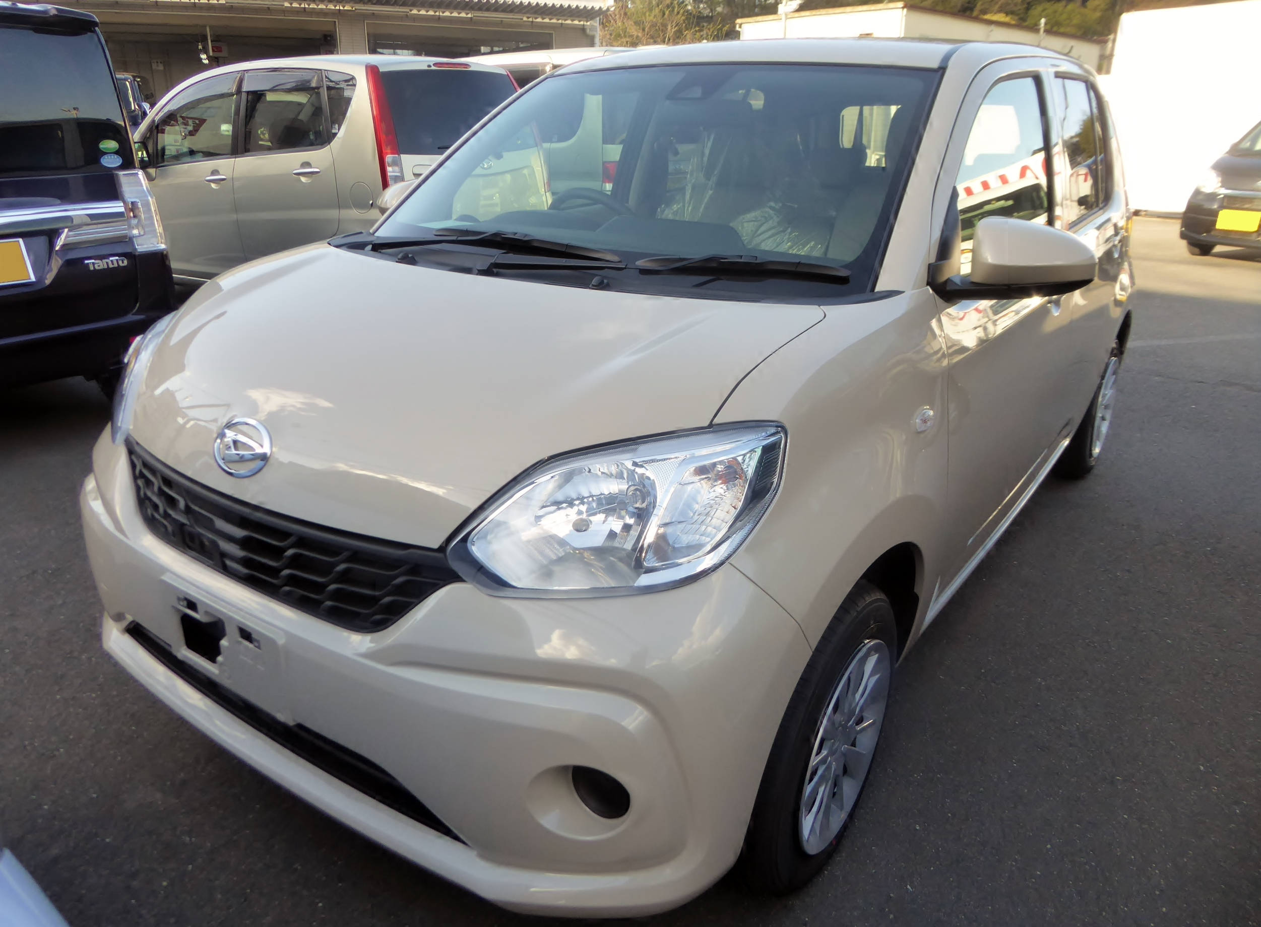 DBA-M700S型ダイハツ・ブーンX"LパッケージSA II"をフロントから撮影。